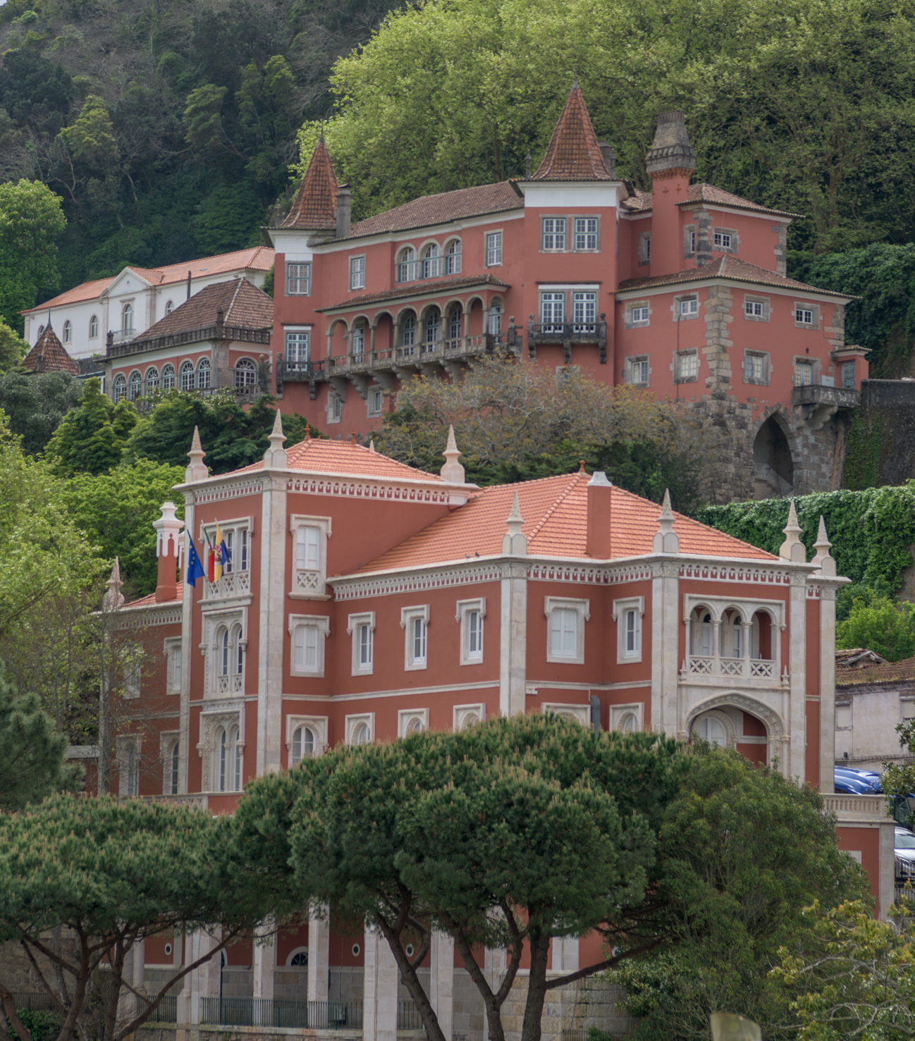 Sintra, Portugal